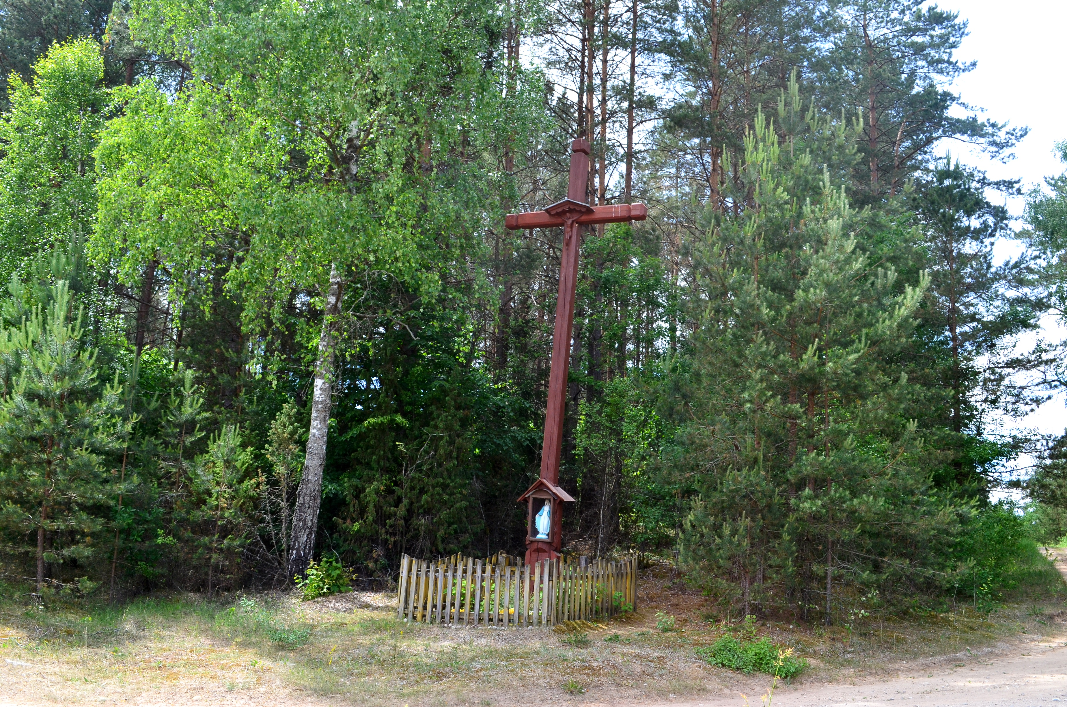 Žiogelių kaimo kryžius, Druskininkų sav.